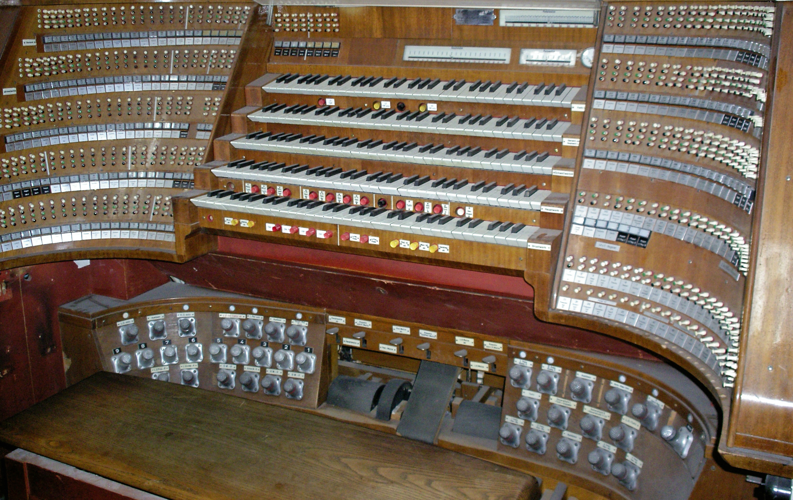 Spieltisch der Orgel in Nürnberg, St. Lorenz